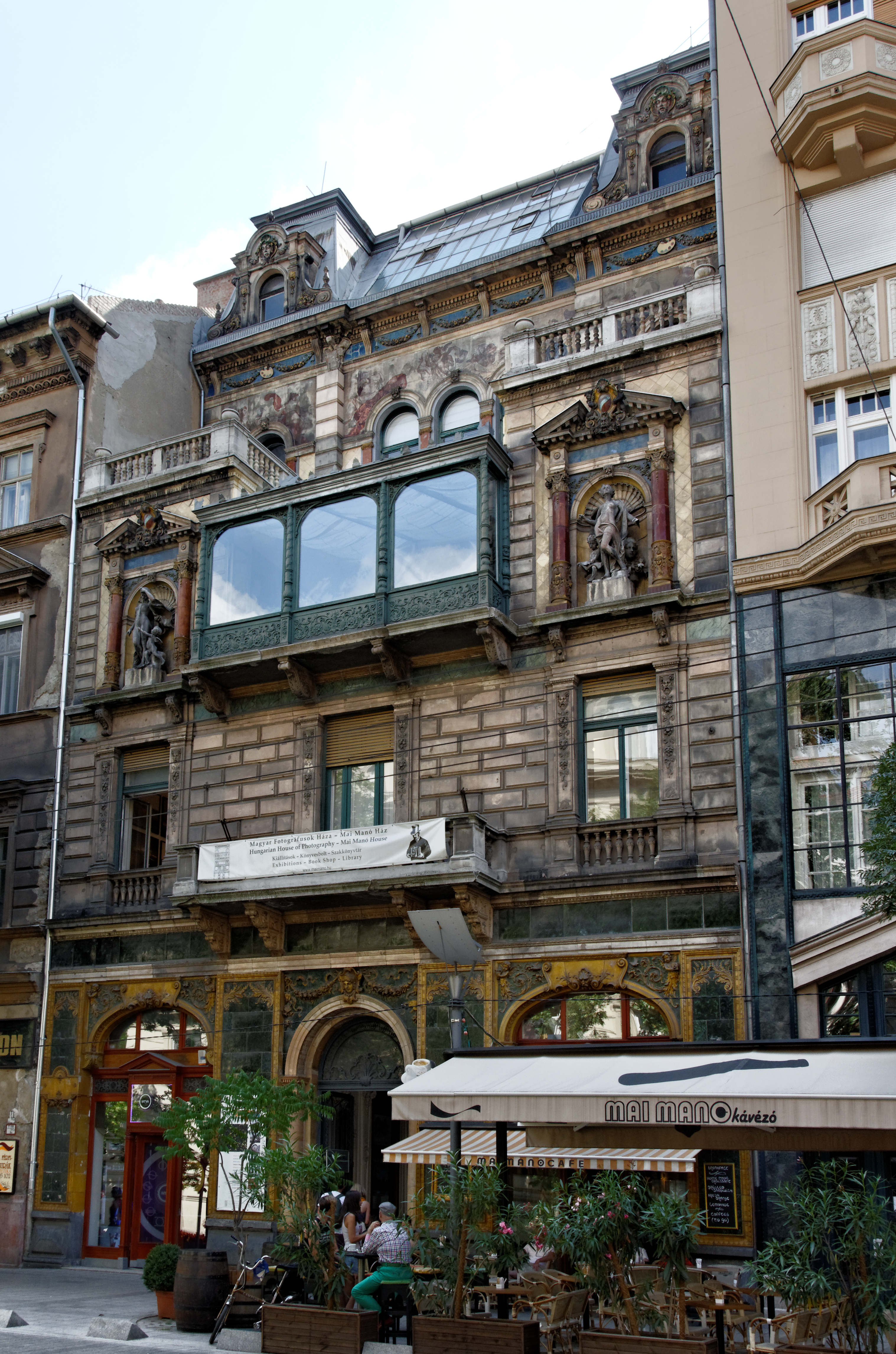 Façade de la maison du photographe Manó Mai (Nagymező utca, Budapest), actuellement maison hongroise de la photographie. A droite, parmi les motifs en faïence du rez-de-chaussée, on aperçoit un chérubin tenant une chambre photographique